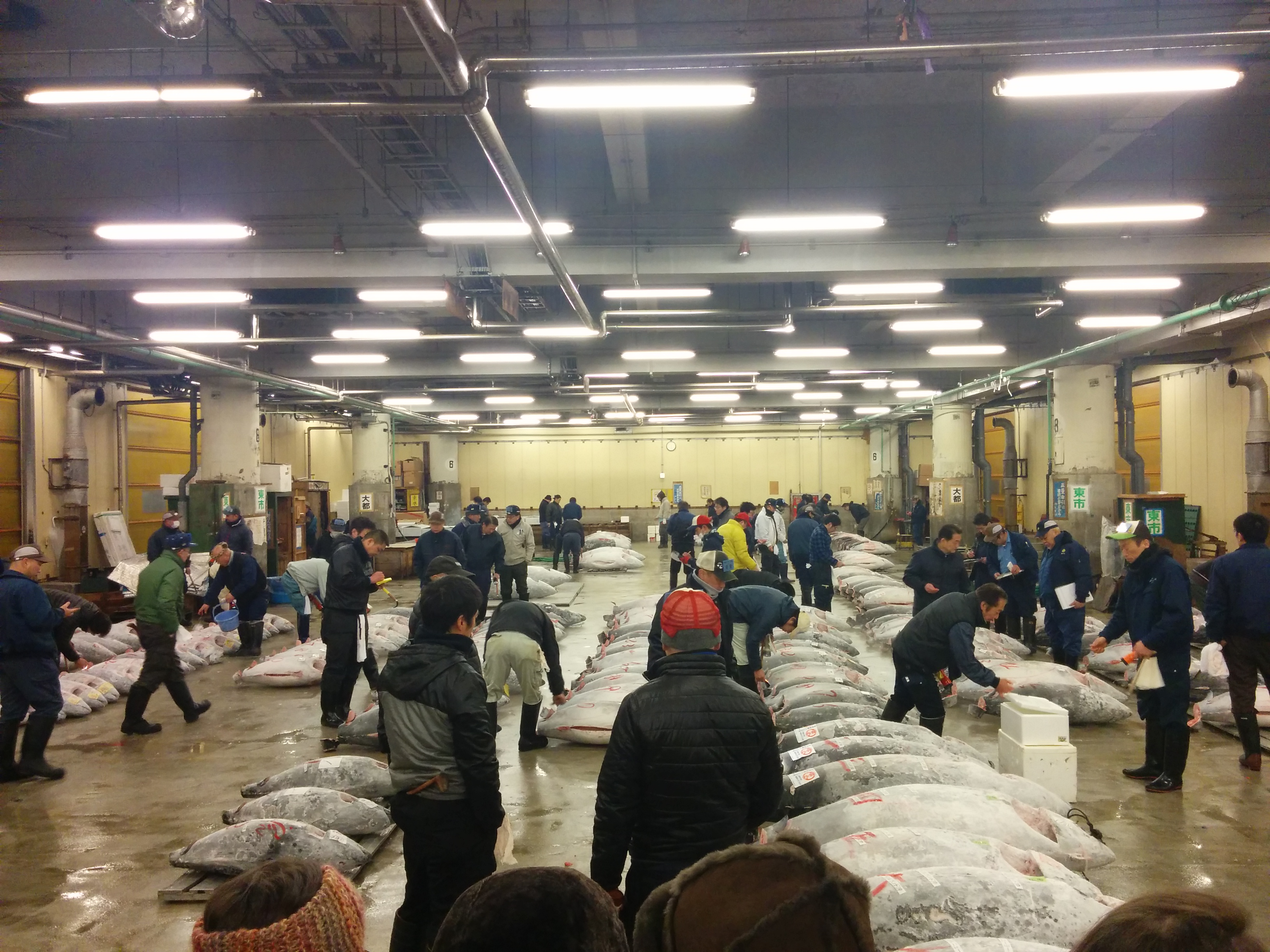 tsukiji fish market